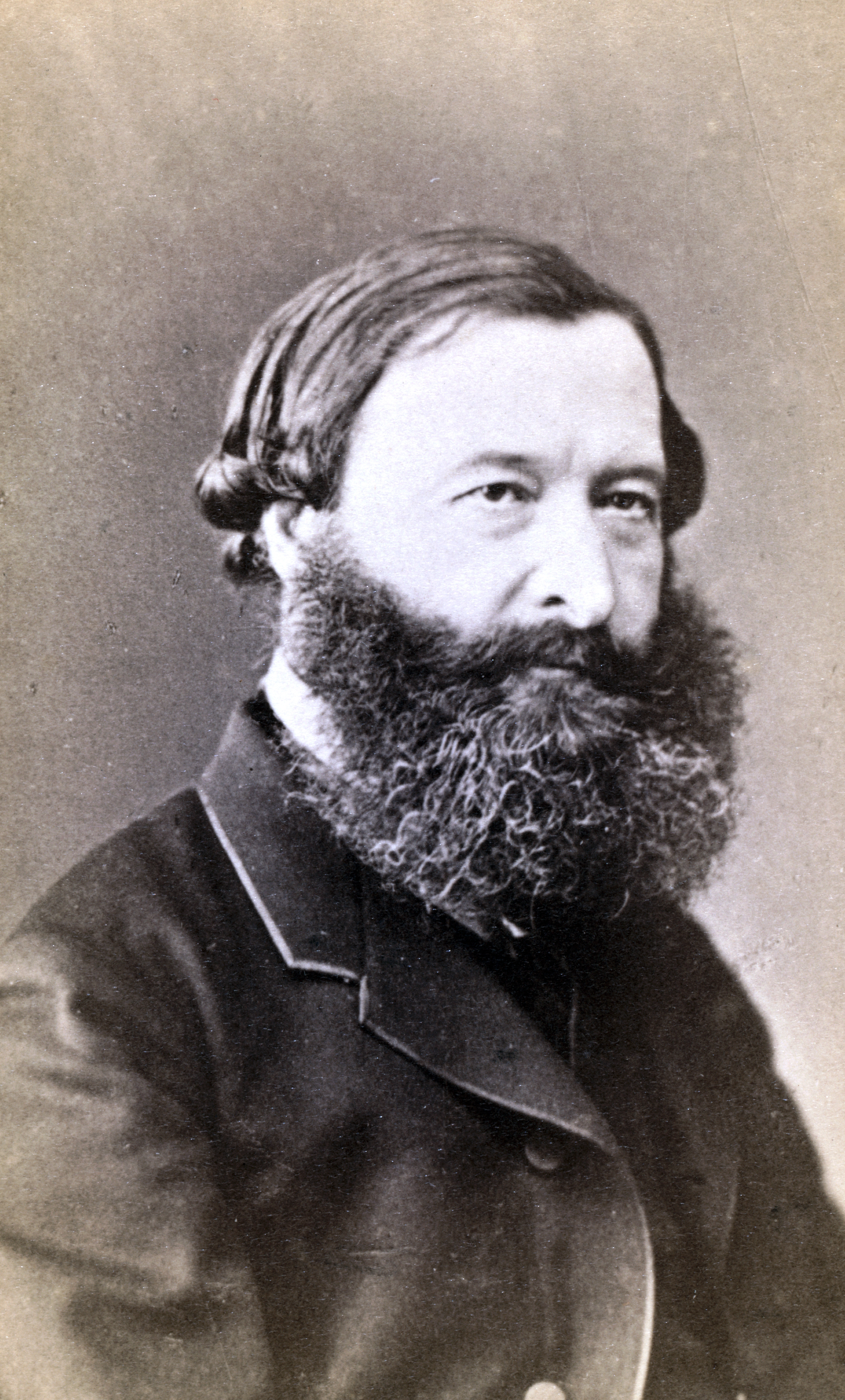 Самарин, Юрий Фёдорович